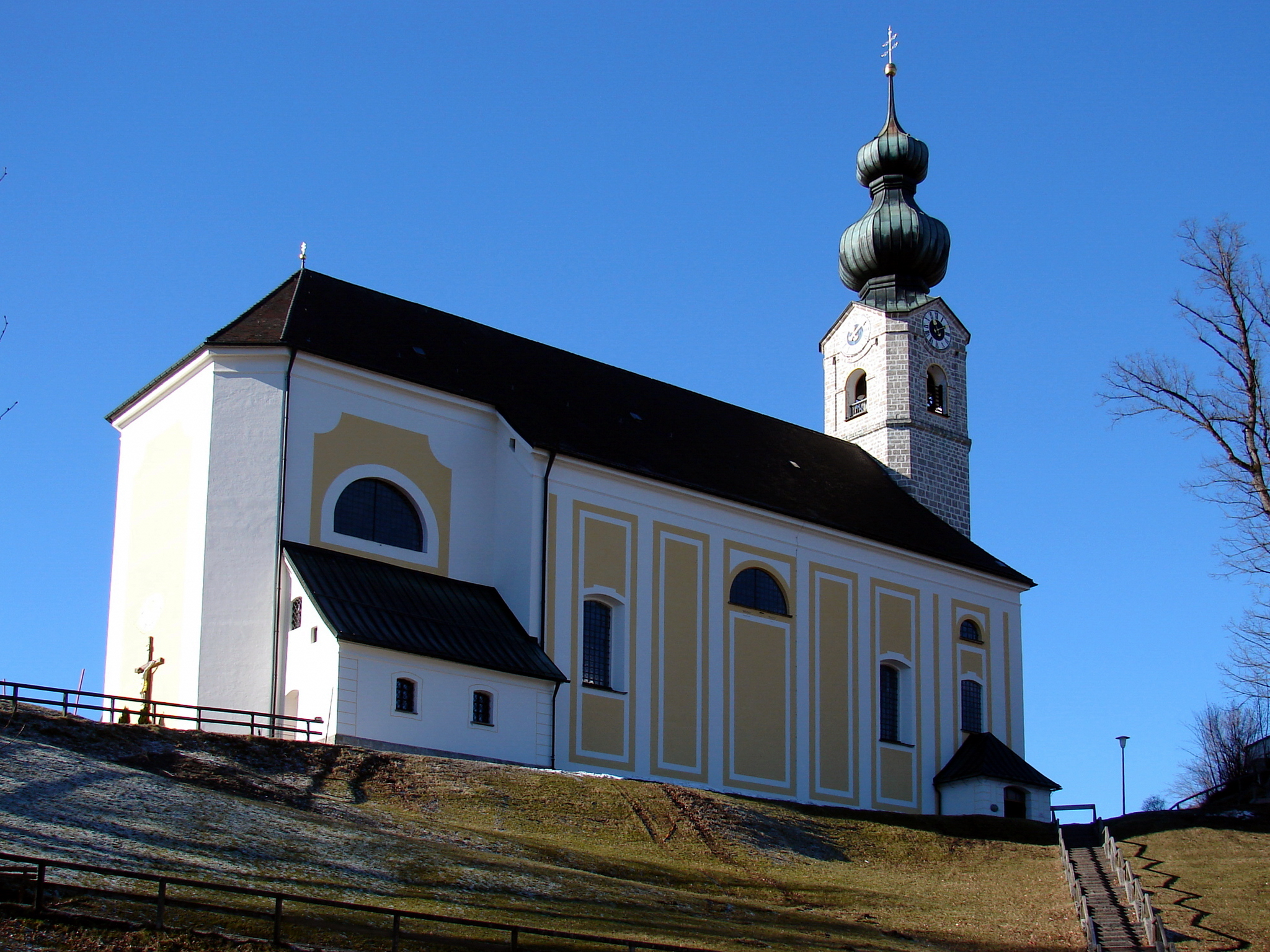 Katholische Pfarrkirche St. Georg, ein talbeherrschender Bau von 1738 bis 1757 mit hochromanischer "Ruhpoldinger Madonna"